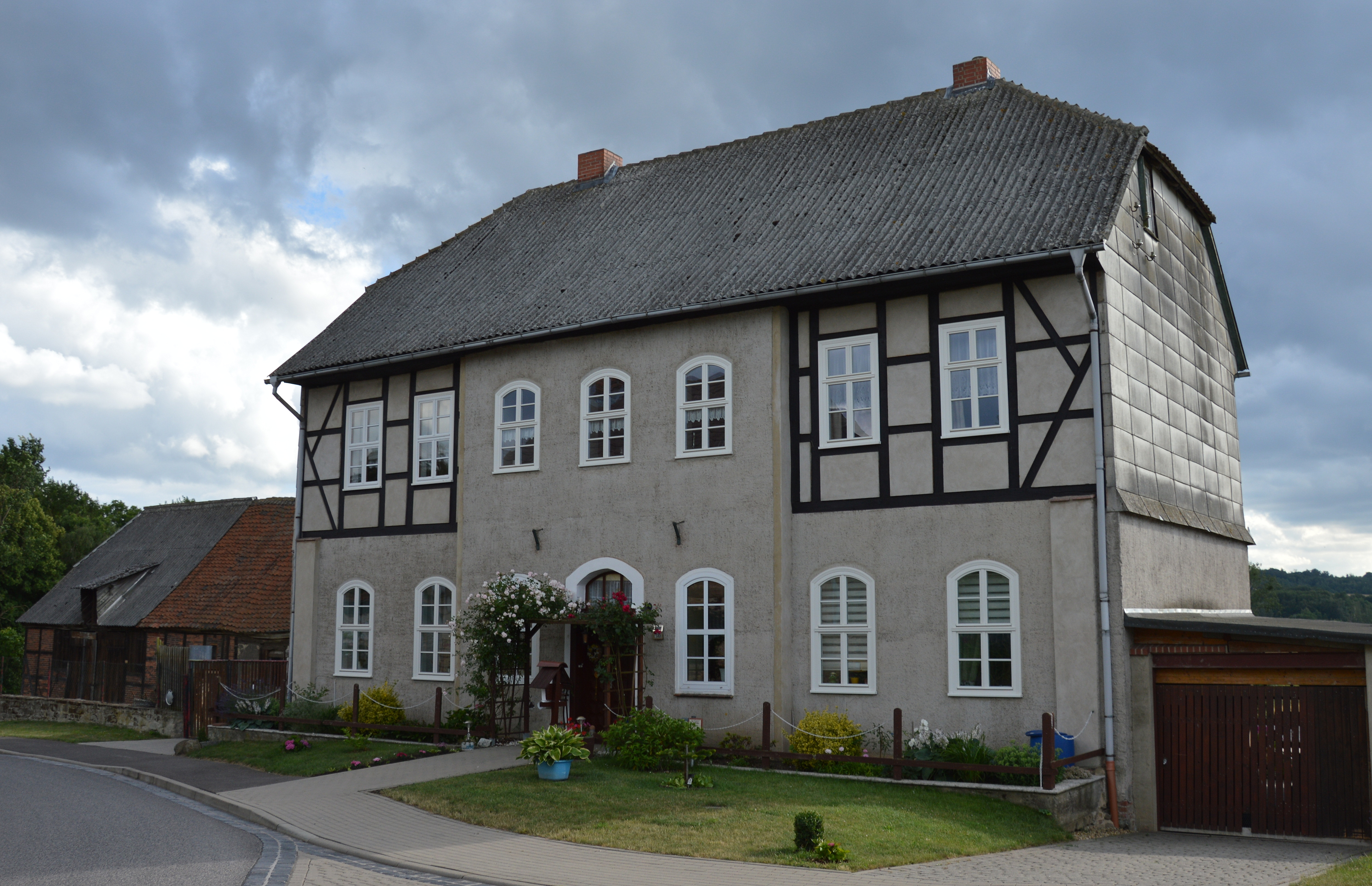 Haus Dorfstraße 30 in Groß Bartensleben